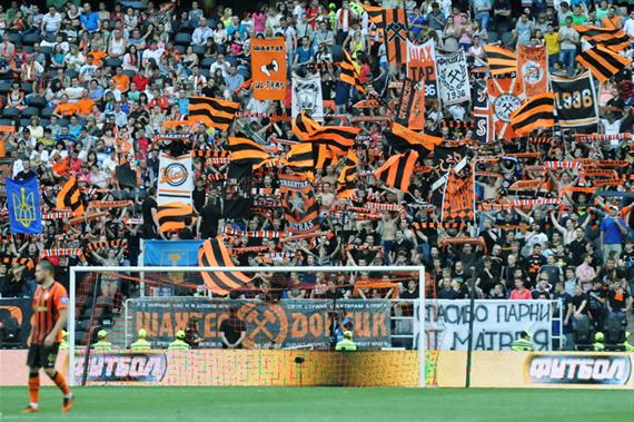 Вболівальники ФК Шахтар